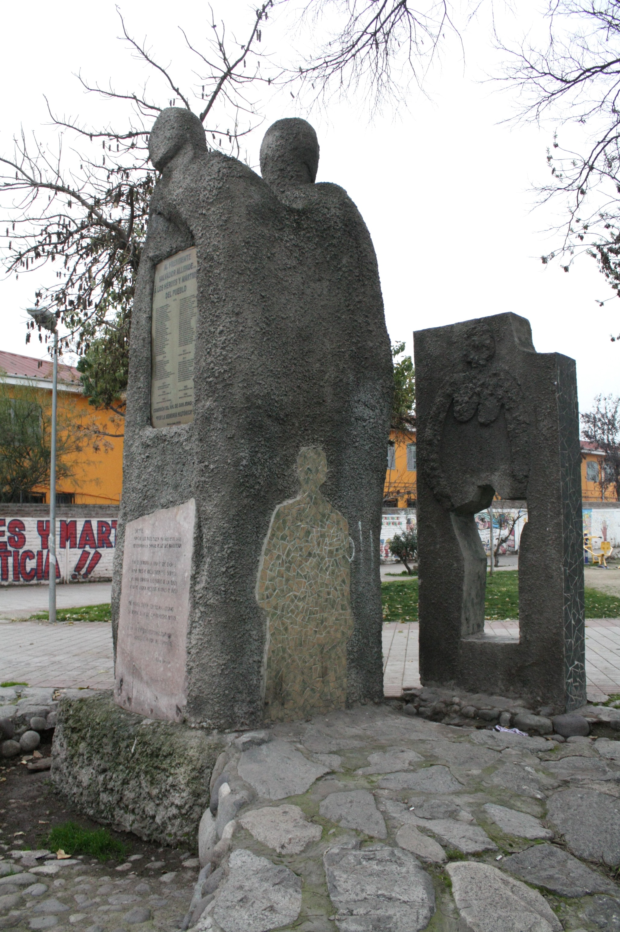 Visión lateral del monumento en la plaza.